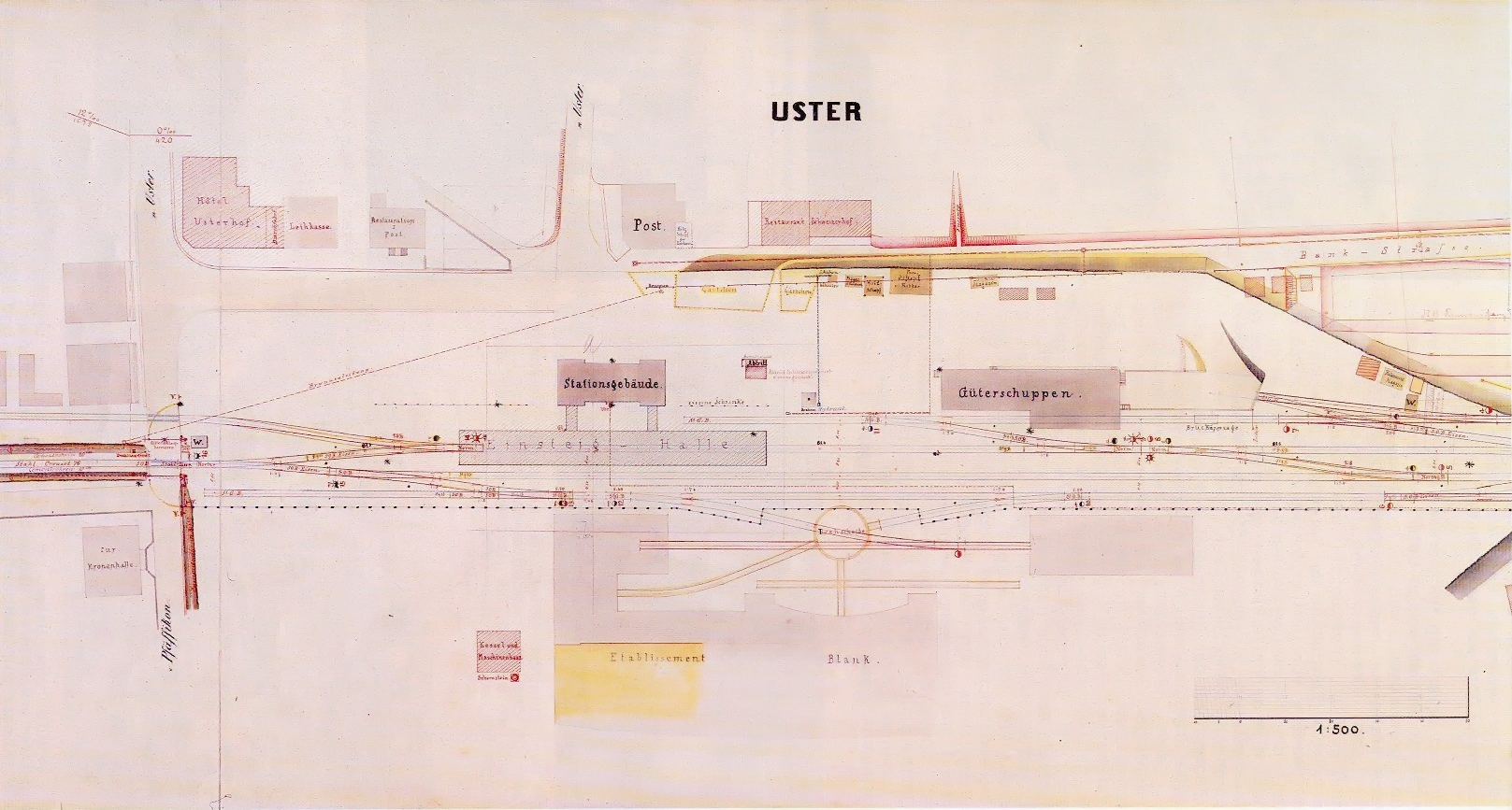 Gleisplan des Bahnhof Uster, 1889